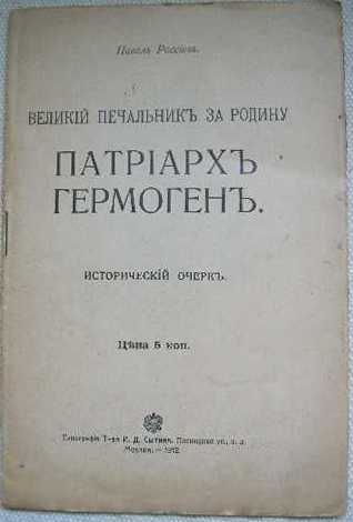 Книга Павел Россиев